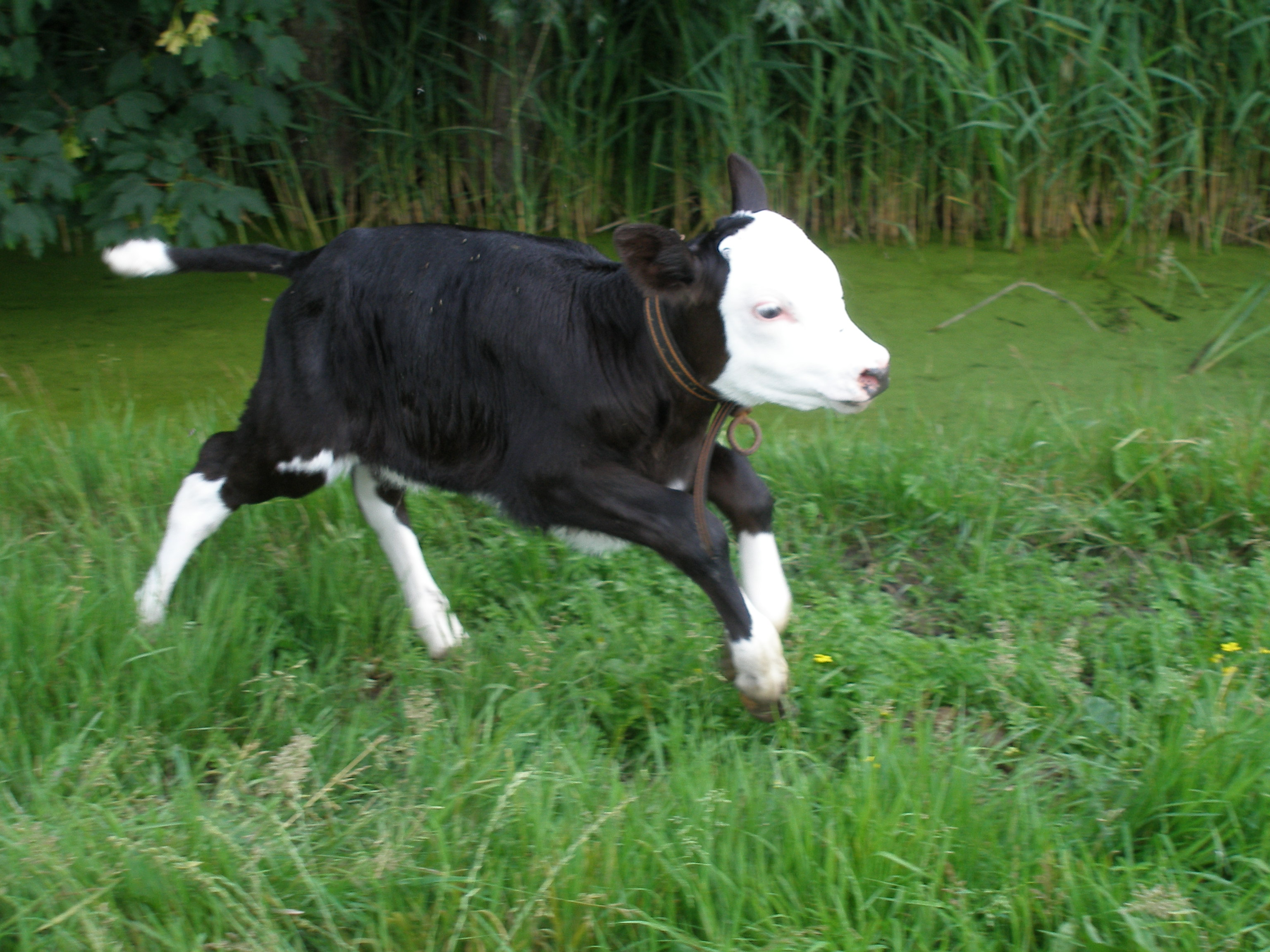 kalf – kalfje zonder oormerk